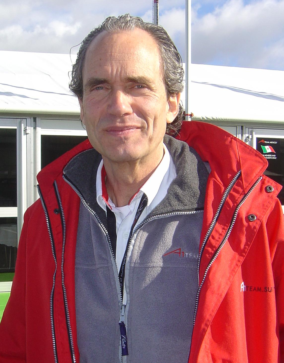 Max Welti entstanden im Rahmen des A1GP-Rennwochenendes auf dem Automotodrom Brno